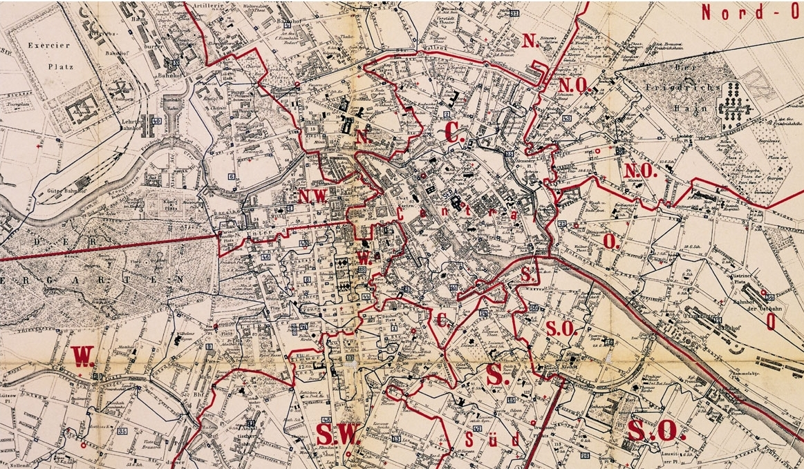 Histor. Plan der Berliner Postbezirke (Ausschnitt)